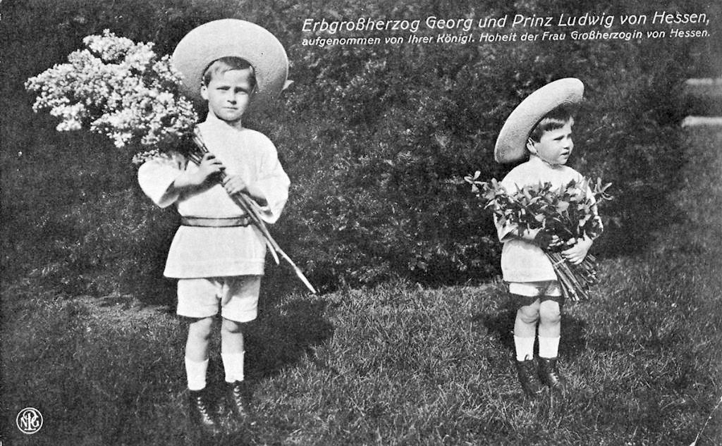 Die Prinzen Georg Donatus und Ludwig im Neuen Palaisgarten (Wohlfahrtspostkarte)